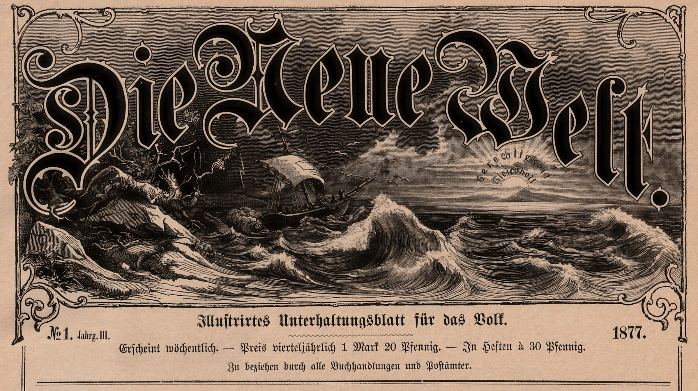 Titelseite der Zeitschrift "Die Neue Welt"